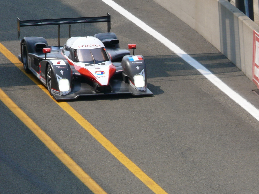 Peugeot 908 retour au stand pendant la journée test des 24H du Mans 2007